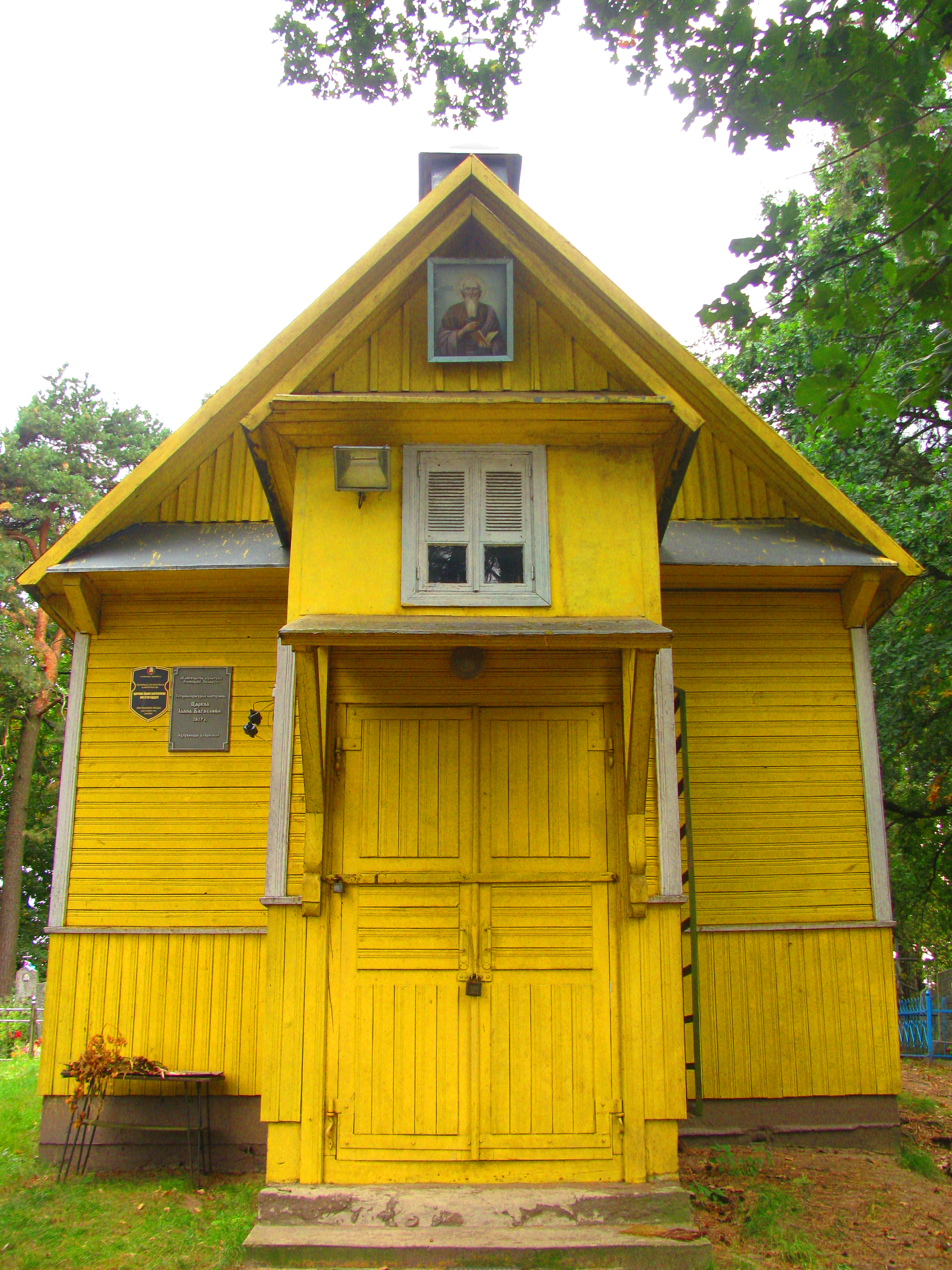 Беларуская (тарашкевіца): Царква Яна Багаслова. в. Стрыгінь This is a photo of Belarusian heritage monument. Reference number: 113Г000153 ( WLM)